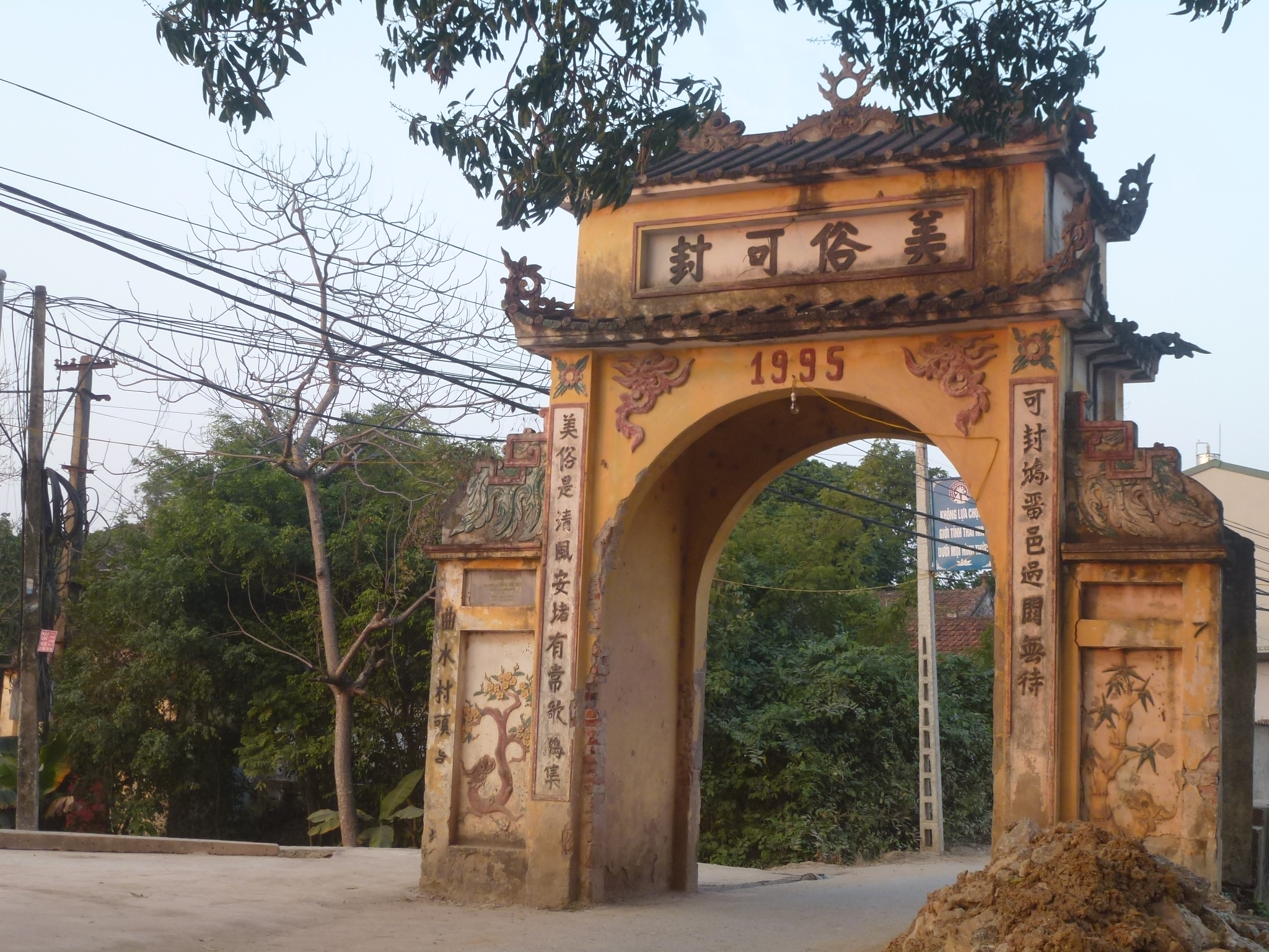 Cổng làng Khúc Thủy, xã Cự Khê, huyện Thanh Oai, Hà Nội, Việt Nam